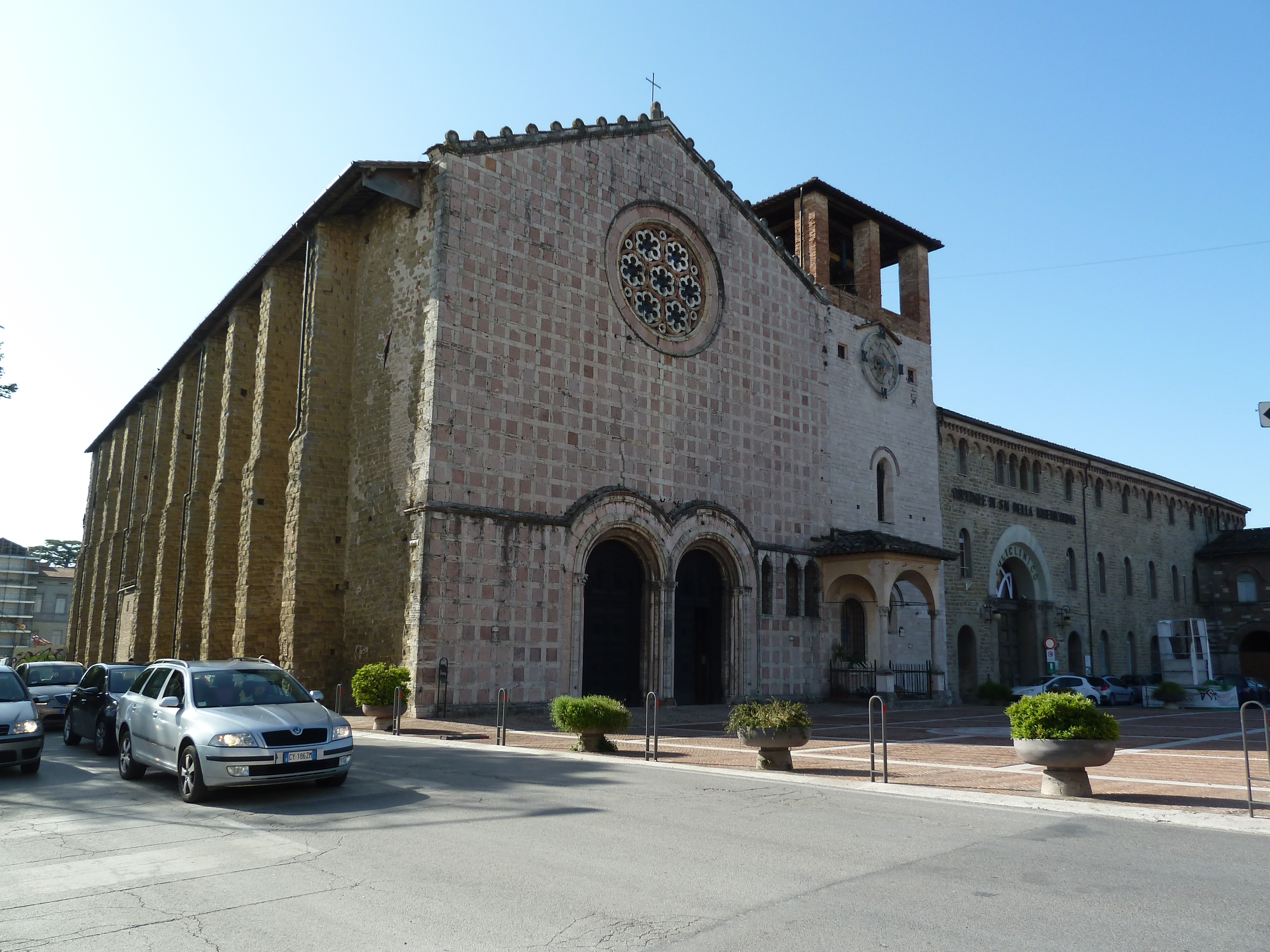 Eglise Santa Maria de Monteluce se situe à Pérouse-Ombrie-Italie